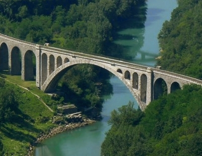 Solkanski most čez Sočo